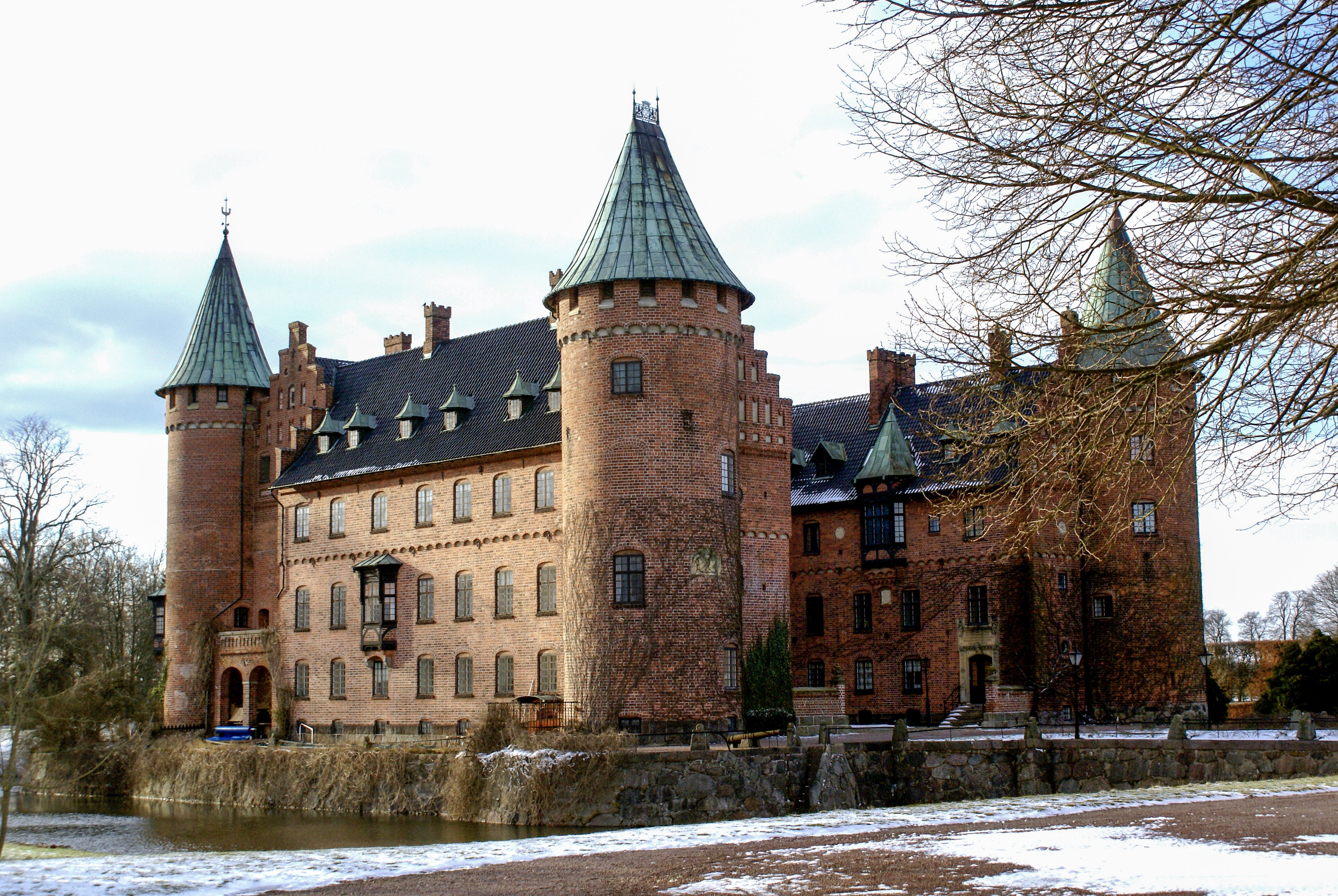 Trolleholms slott, Skåne, Sweden